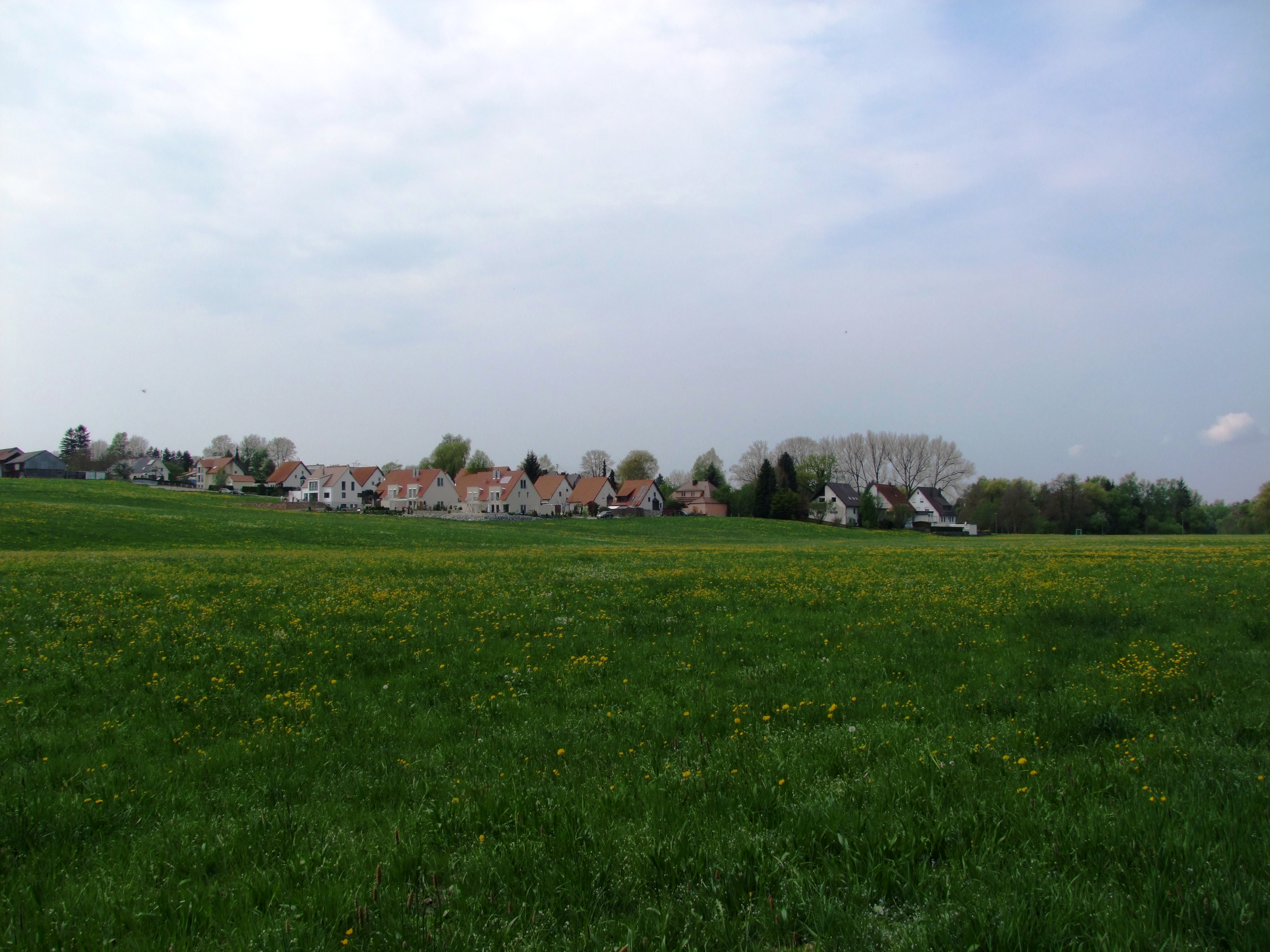 Hart in Oberschwaben, Stadtteil von Memmingen